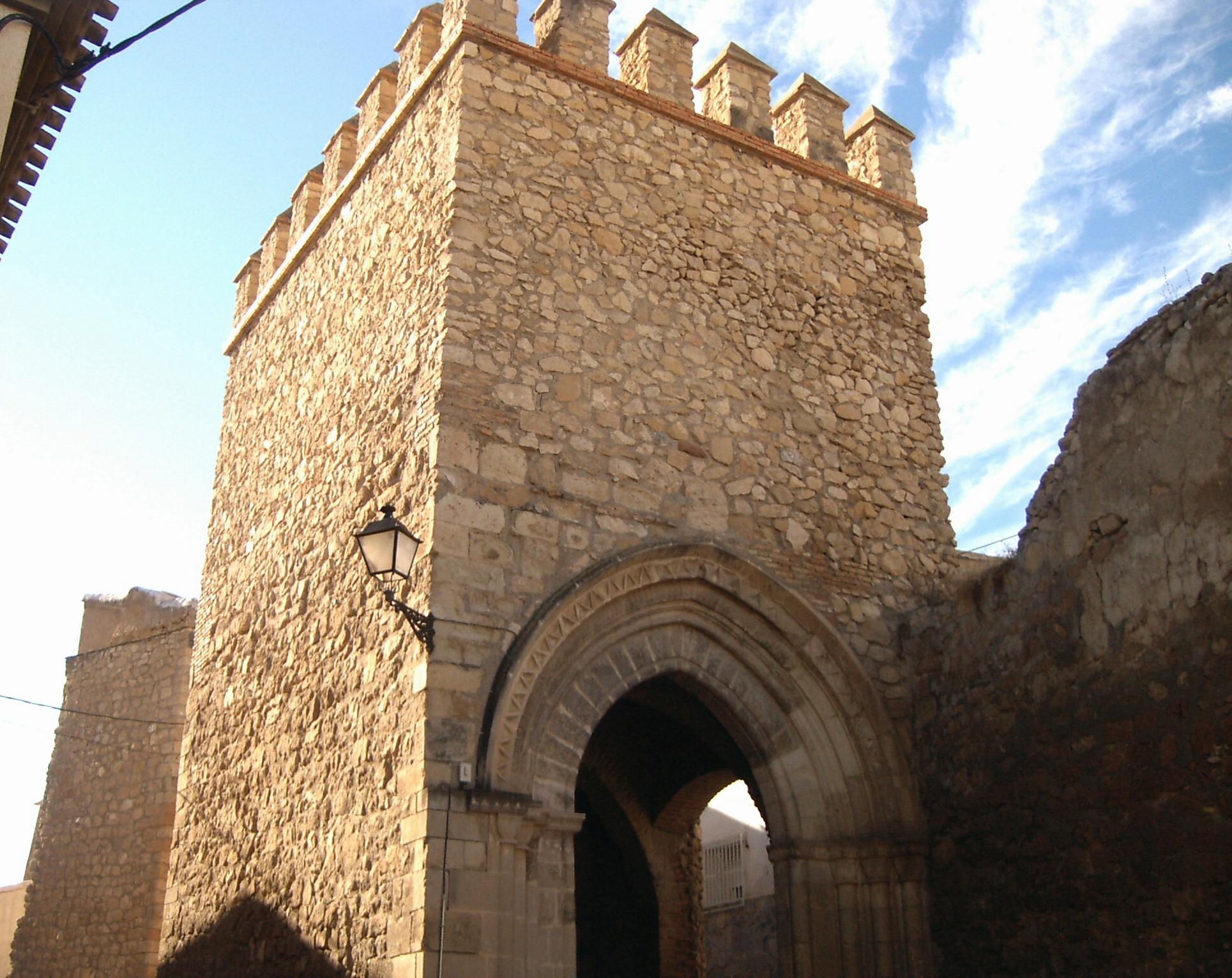 Lorca. Porche de San Antonio (puerta de la muralla medieval)